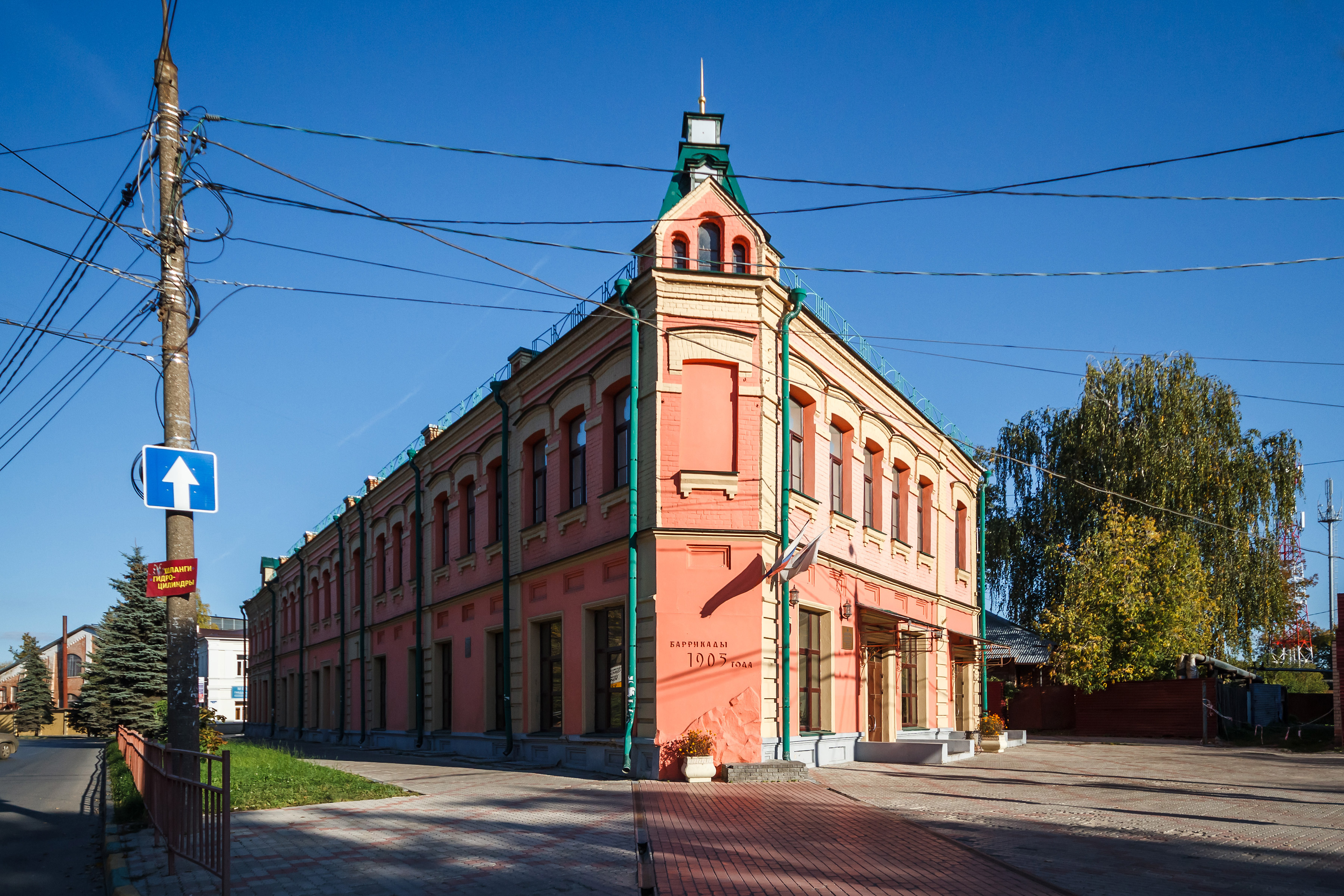 Доходный дом: улица Коминтерна, 173, Нижний Новгород, Нижегородская область